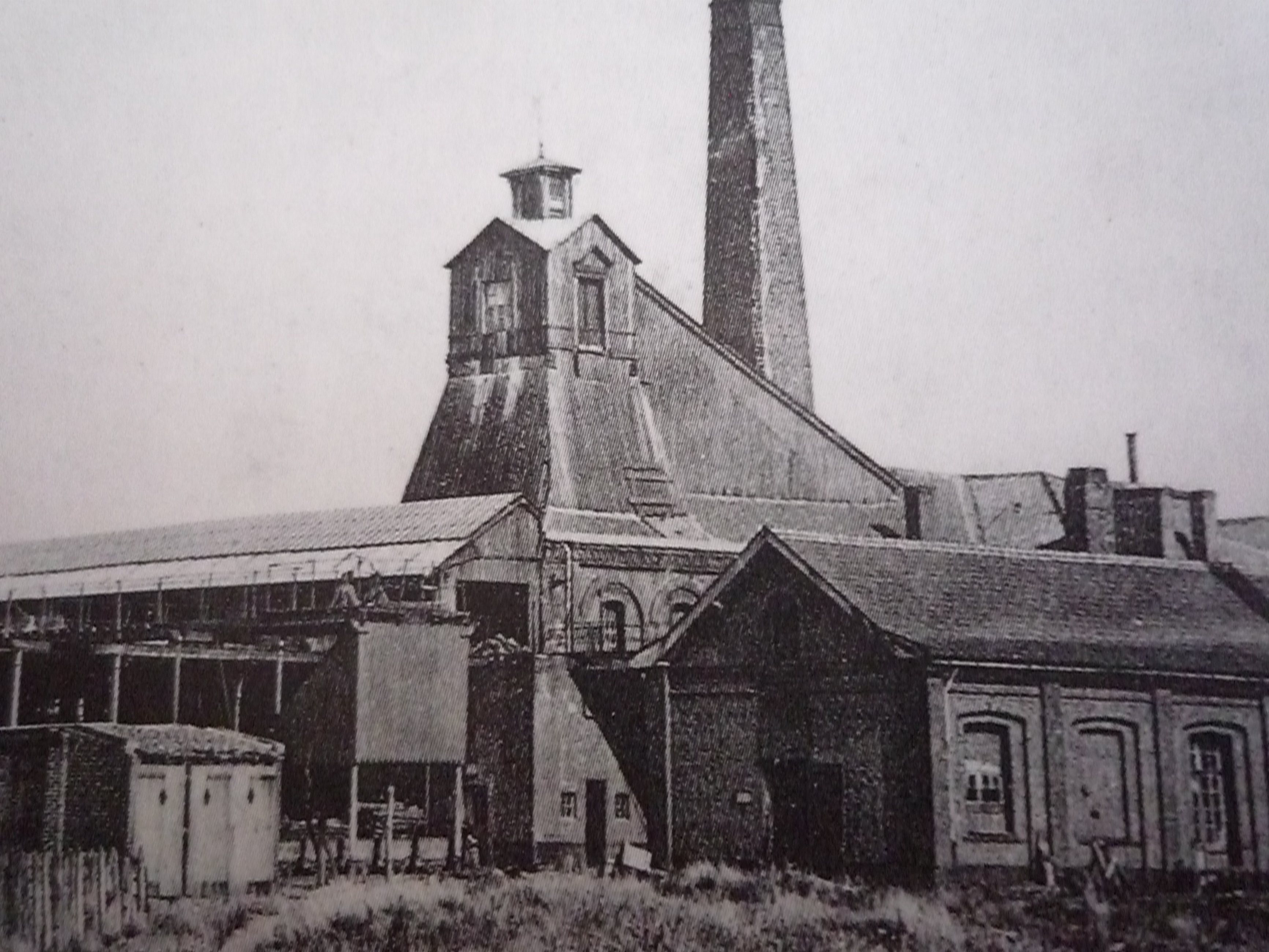 La Fosse n° 9 de la Compagnie des mines de Béthune était un charbonnage constitué d'un seul puits situé à Annequin, Pas-de-Calais, Nord-Pas-de-Calais, France.